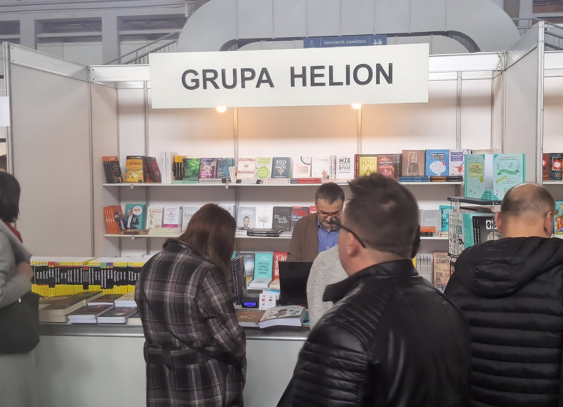 Wydawnictwo Helion, Poznańskie Targi Książki 2018